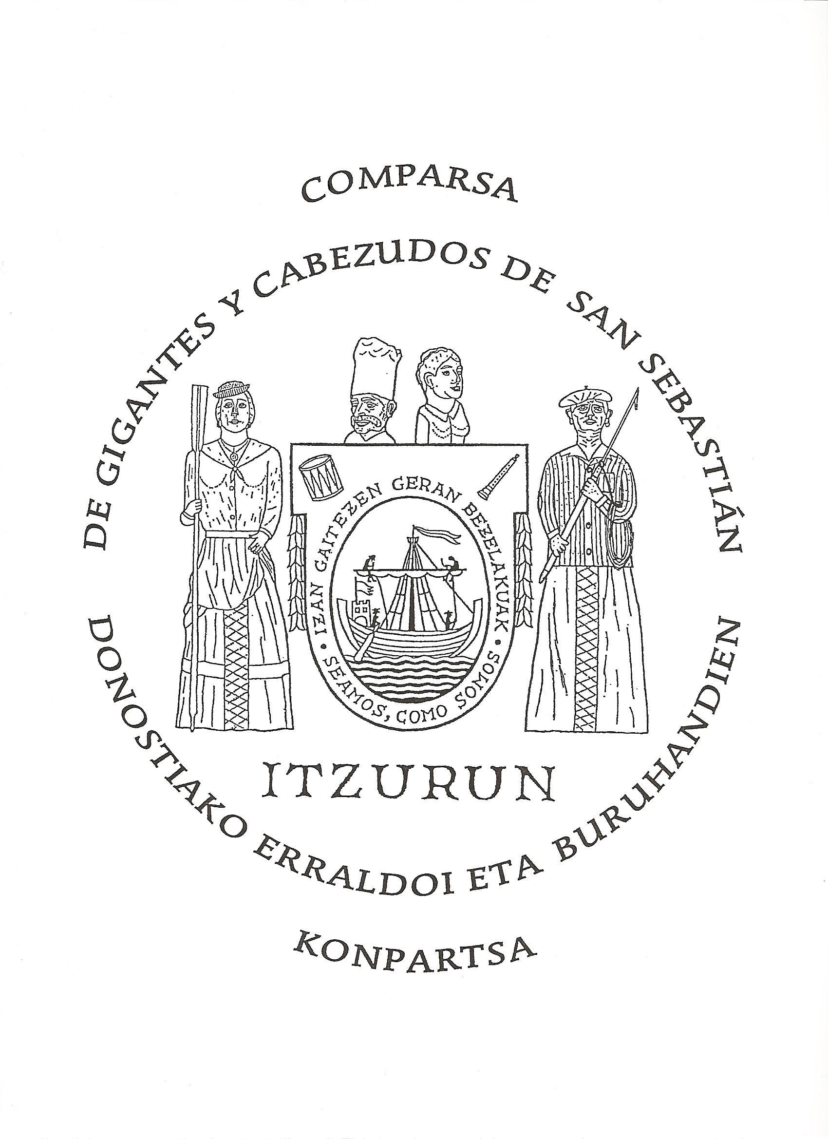 Logo de la Asociación Itzurun - Comparsa de gigantes y cabezudos de Donostia - San Sebastián